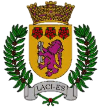 Este es el escudo correcto del Municipio de Ciales